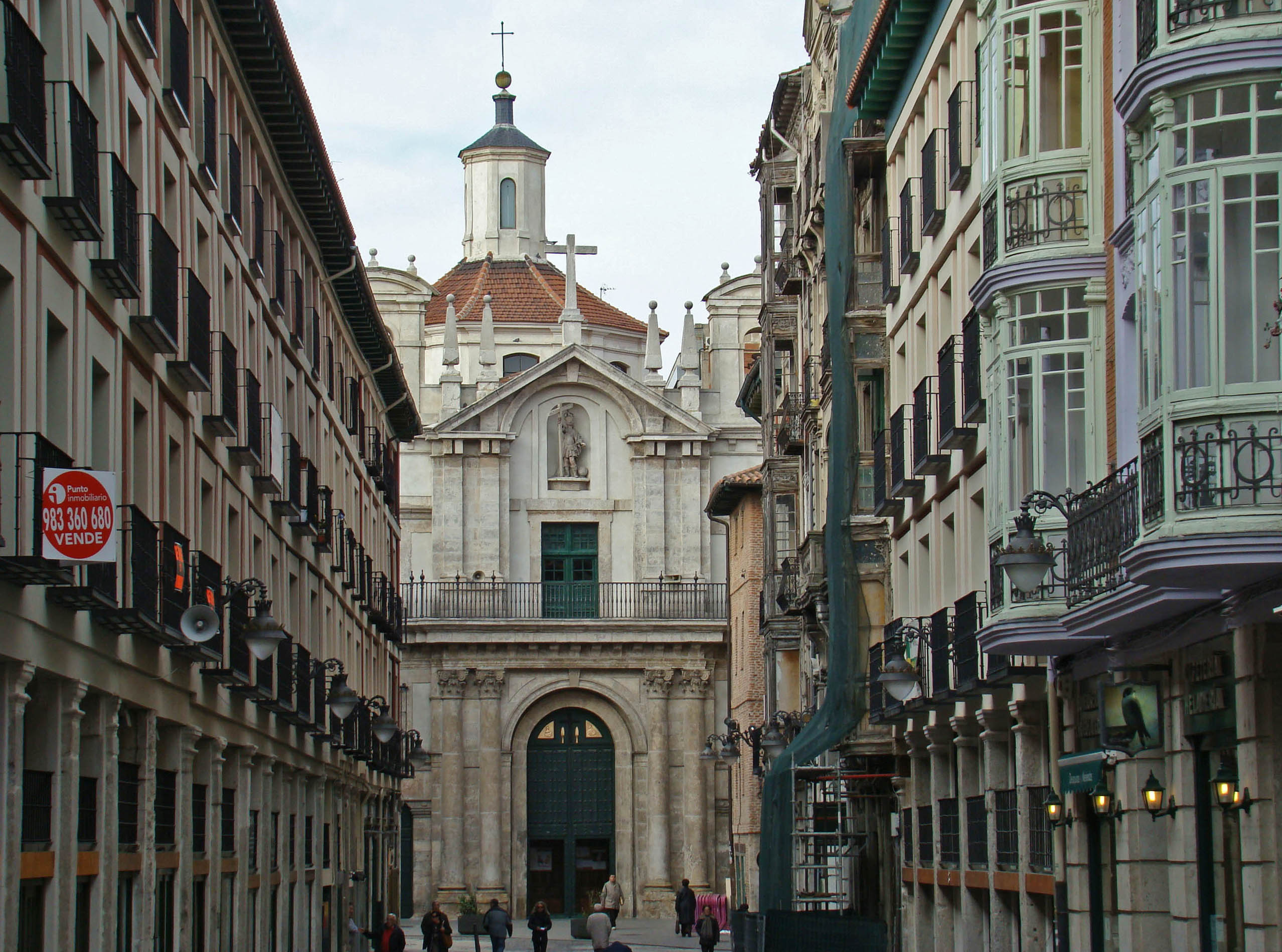 Iglesia de la Vera Cruz al fondo de la calle de la Platería, en Valladolid (España). Es una iglesia penitencial. El arquitecti Diego de Praves intervino en la fachada.